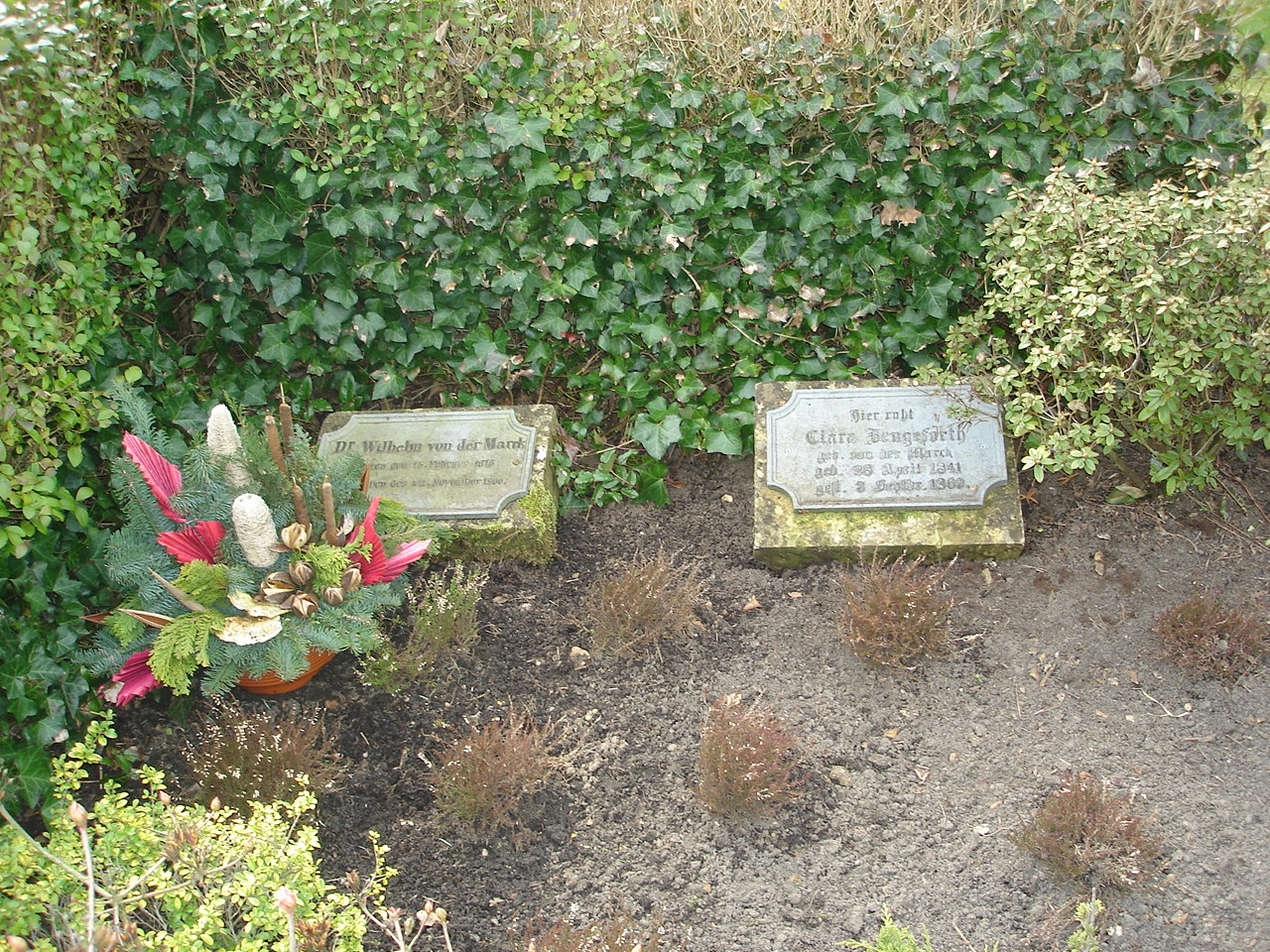 Grab des Dr. Wilhelm von der Marck auf dem Hammer Ostenfriedhof